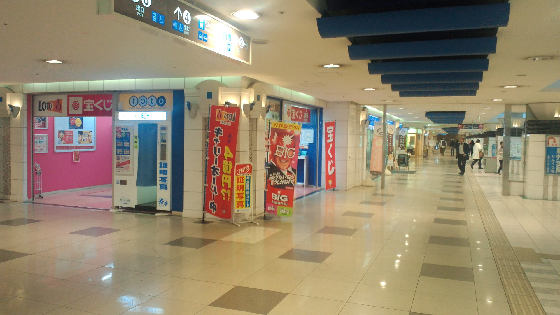 りんくうPapillio構内